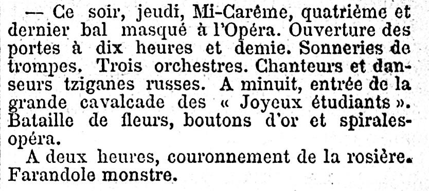 Journal des débats, page 3, 6ème colonne. La Mi-Carême des étudiants 1894 à l'Opéra.